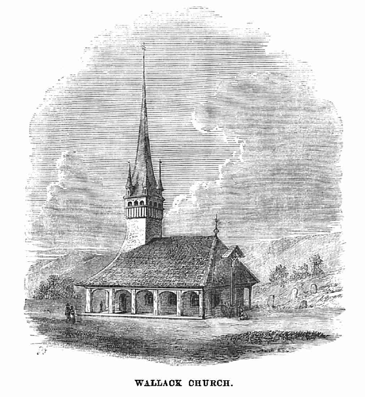 Biserică de lemn dispărută, dintr-un sat de pe valea Mureșului, amonte de Reghin, spre Toplița.